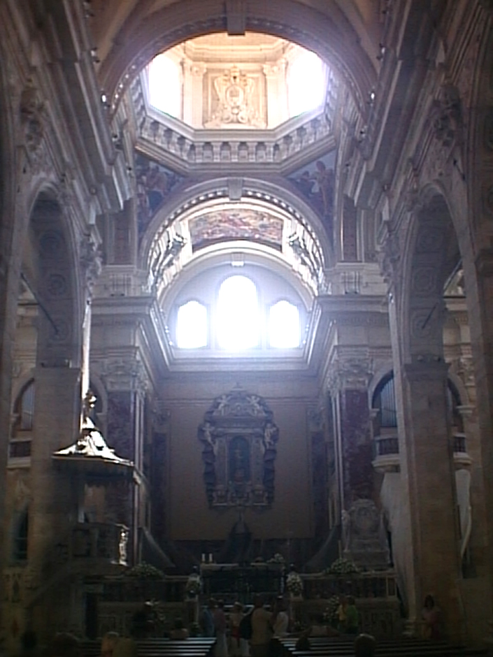 Navata centrale della Cattedrale di Cagliari